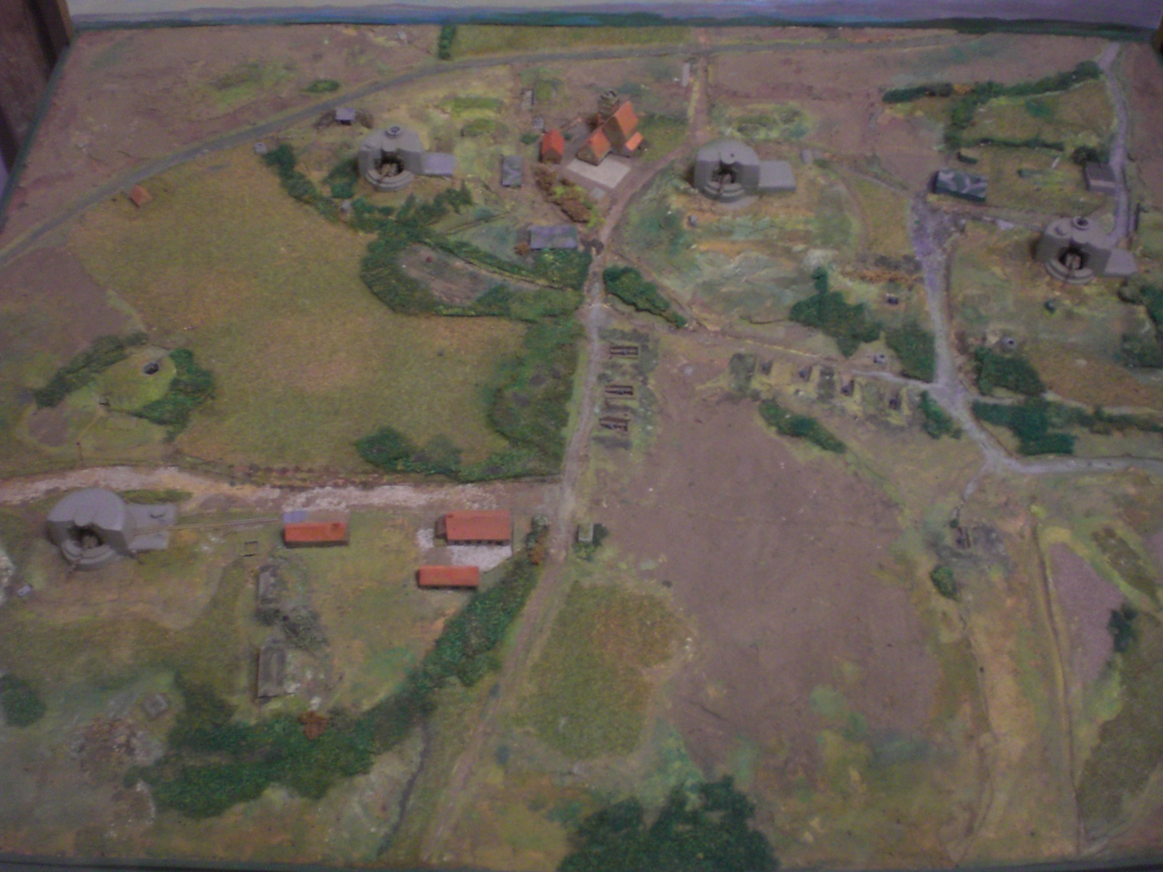 La maquette de situation à l'intérieur du Musée du Mur de l'Atlantique à Audinghen. On y voit l'emplacement de la batterie Todt complète constituée de quatre casemates quasiment situées au même endroit. Le musée est la casemate n°1, la plus à gauche sur la photo et elle est la seule intacte.